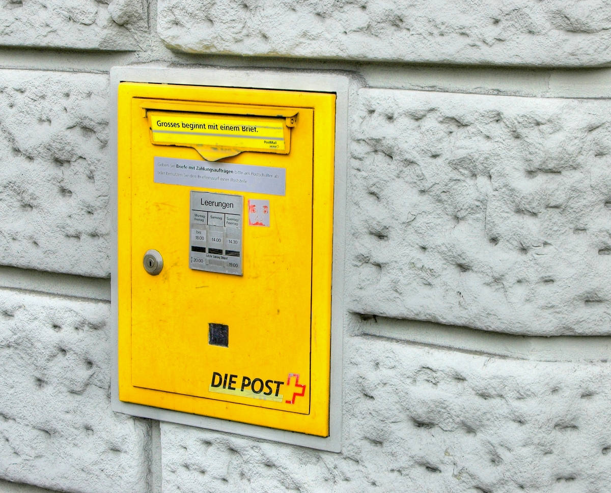 Boîte à lettres de Suisse alémanique au logo de Die Post